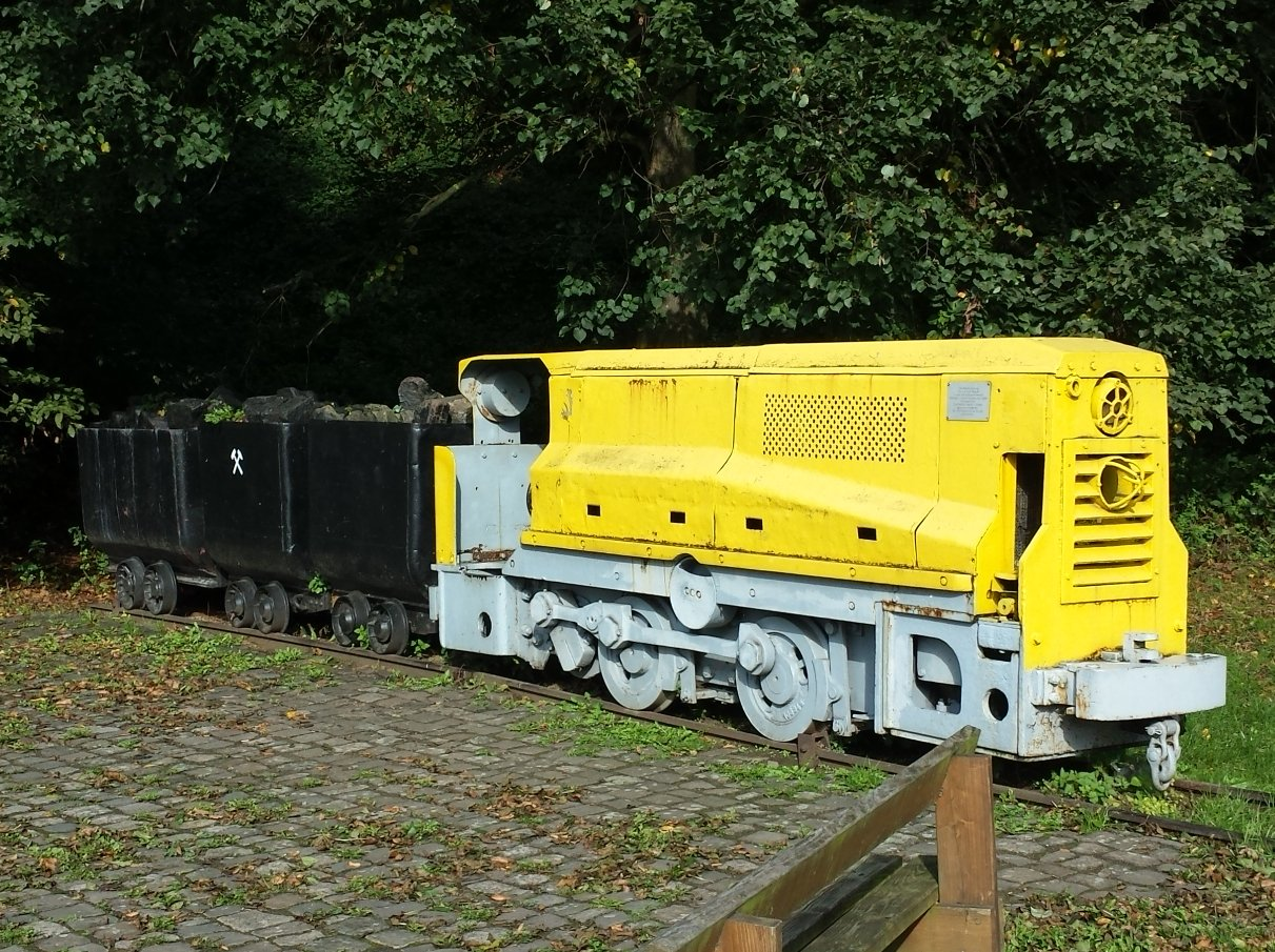 Grubenlok der ehemaligen Zeche Gibraltar Erbstollen